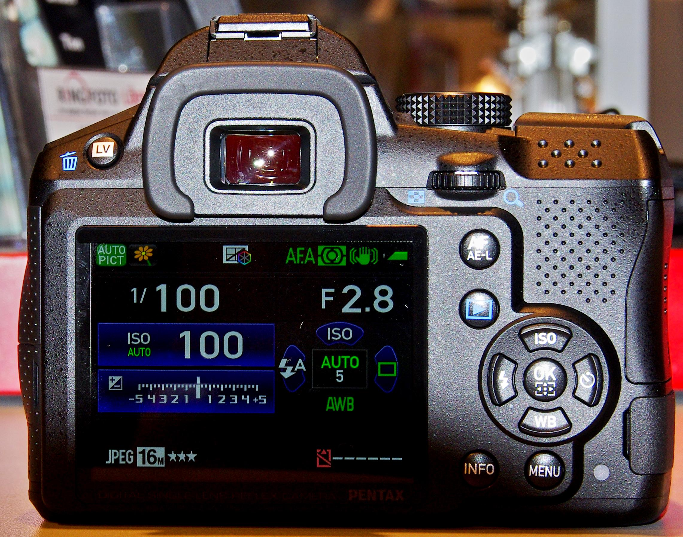 Die Rückseite der Pentax K-30